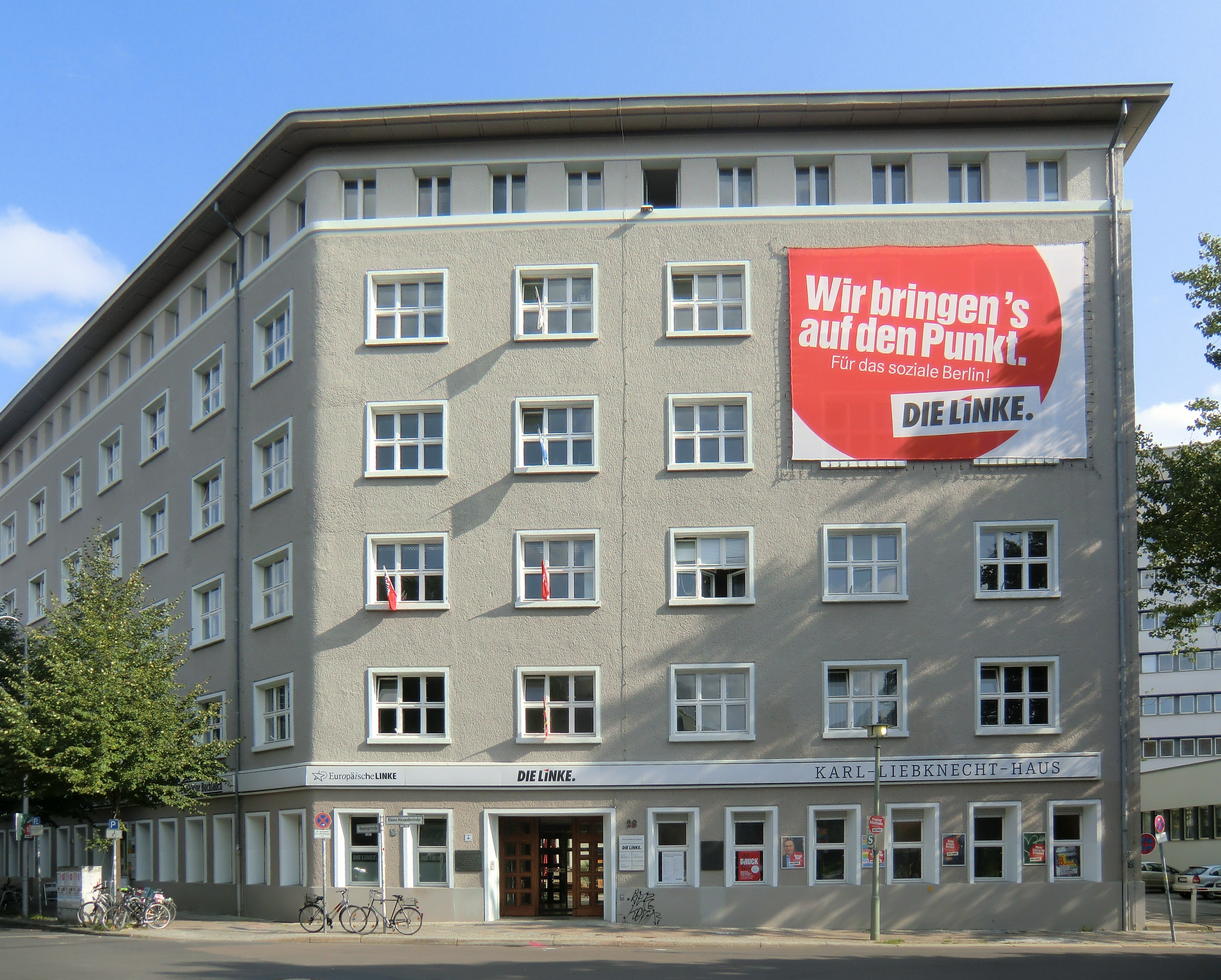 Karl-Liebknecht-Haus in Berlin. Parteizentrale der Partei DIE LINKE. Aufnahme am Vorabend der Wahlen zum Abgeordnetenhaus am 18. September 2011.